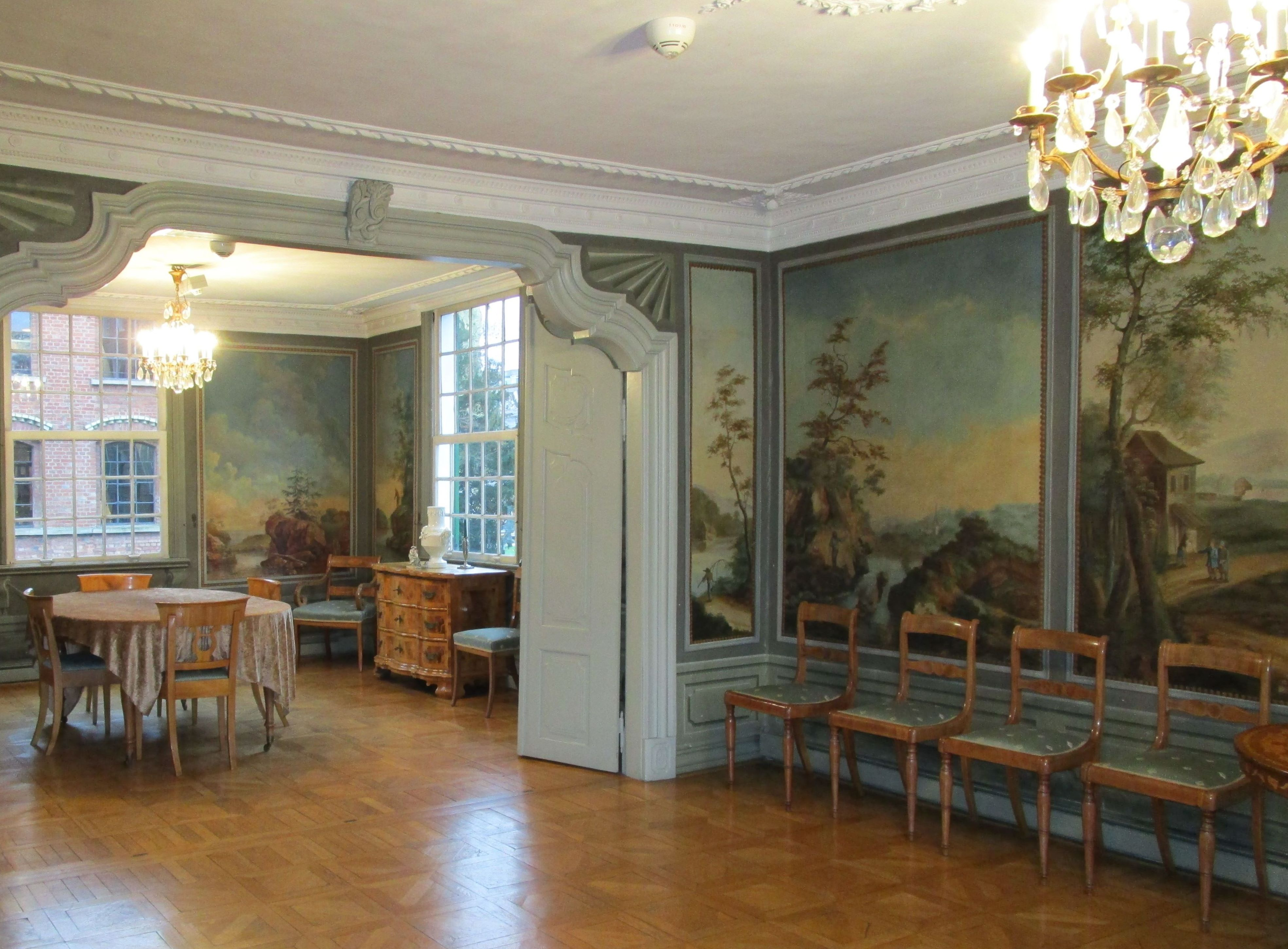 Engel-Haus, Wuppertal-Barmen, Salon im 1. OG